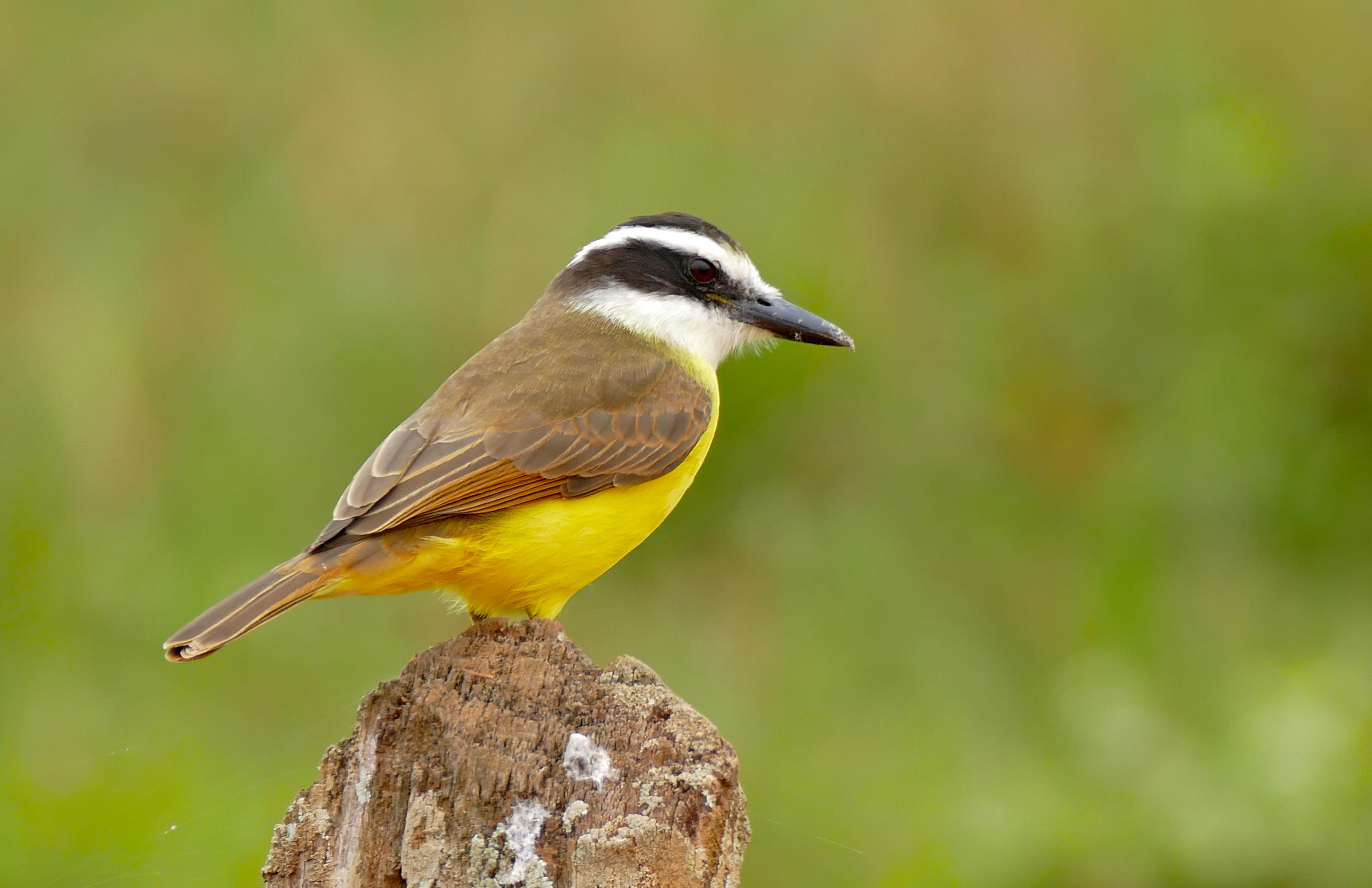 Transpantaneira, Poconé, Mato Grosso, BRAZIL